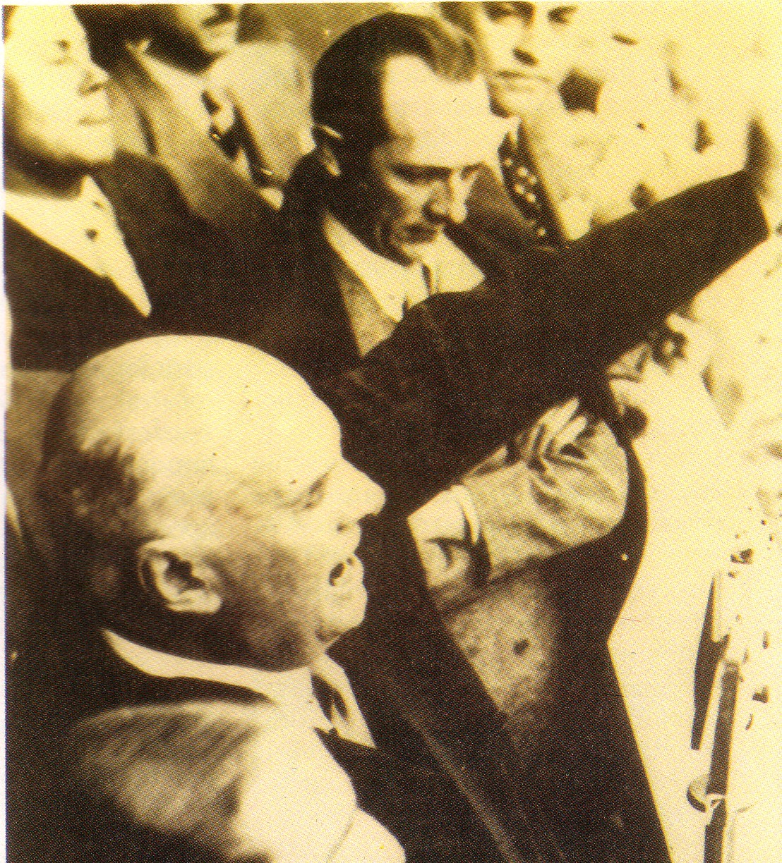 Marcelo T. de Alvear habla Amadeo Sabattini al lado - Plaza Hotel - Cordoba - 1936.